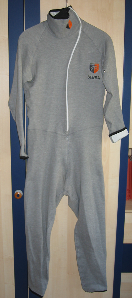 Snijvrij pak, gemaakt van Dymeema